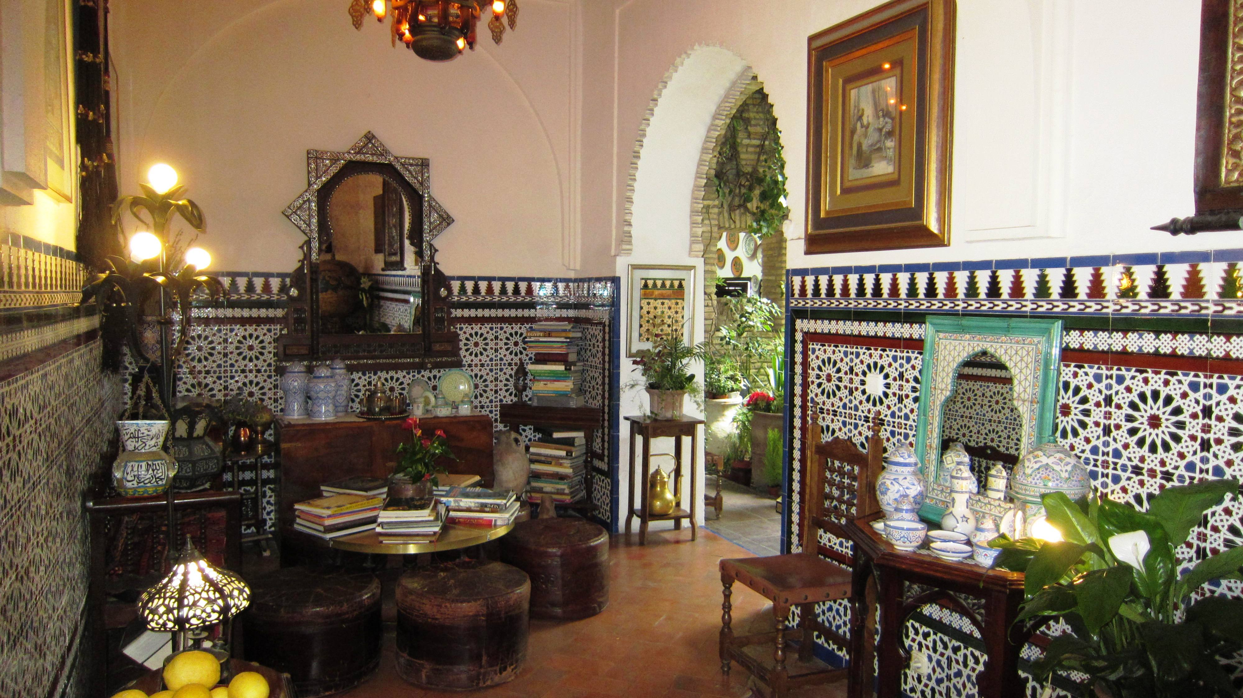 Innenansicht der Casa Andaluz in der Calle Judios, Córdoba